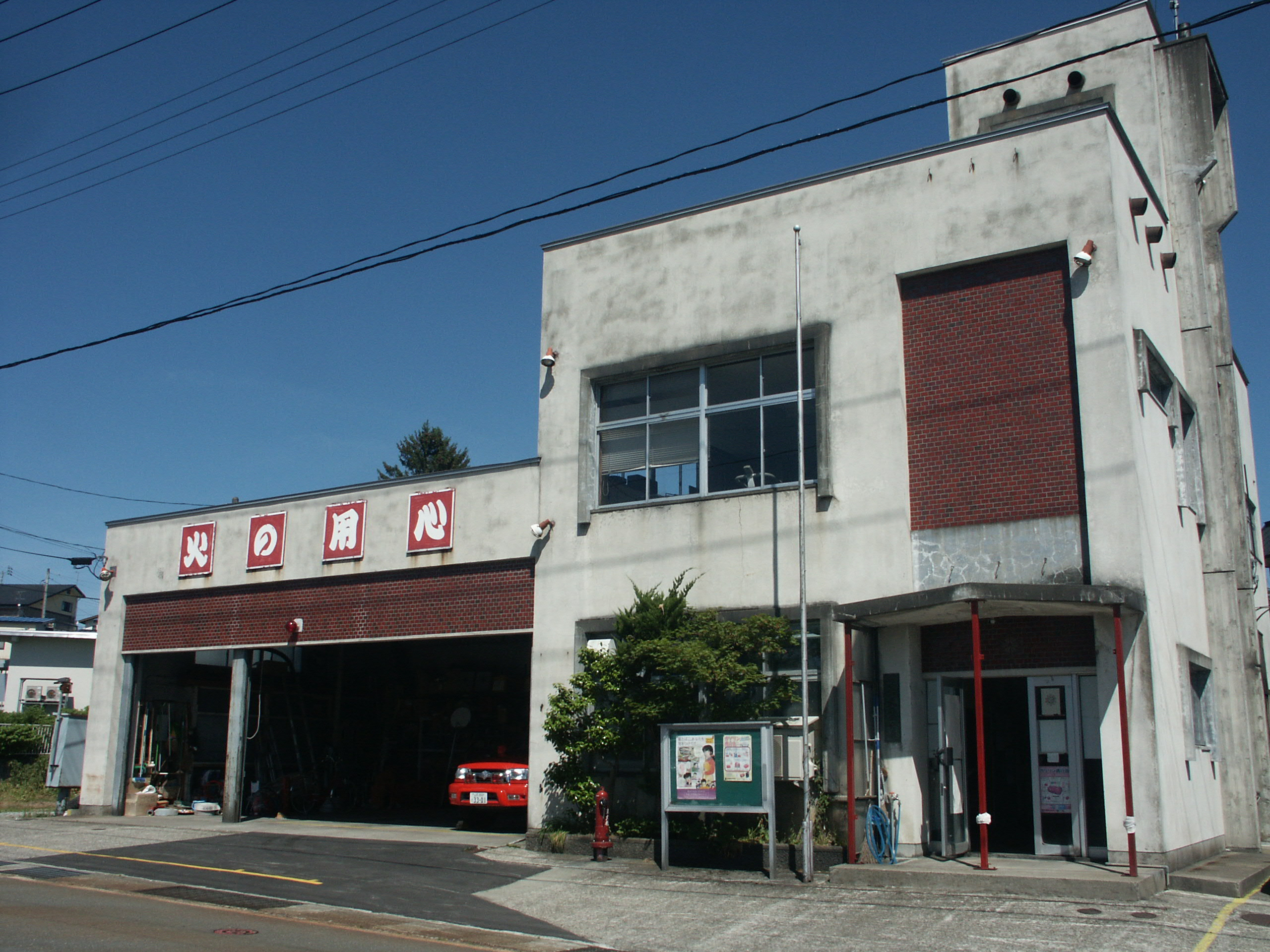 尾花沢市消防本部大石田分署庁舎